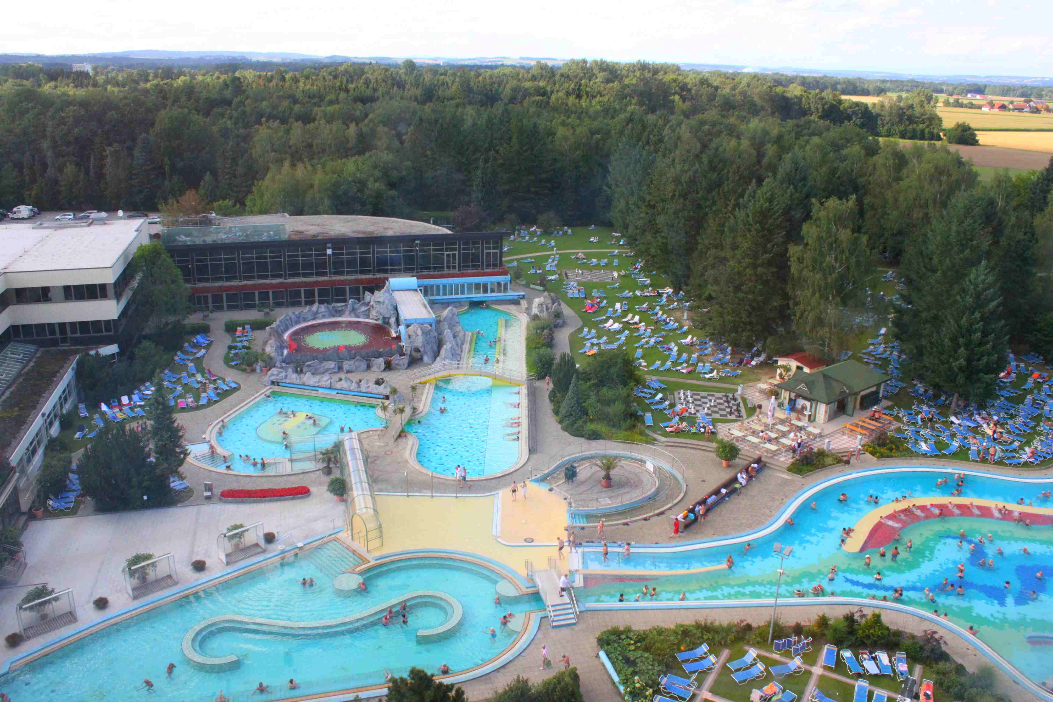 Blick aus dem 8. Stock auf die Badeplatte im Johannesbad in Bad Füssing